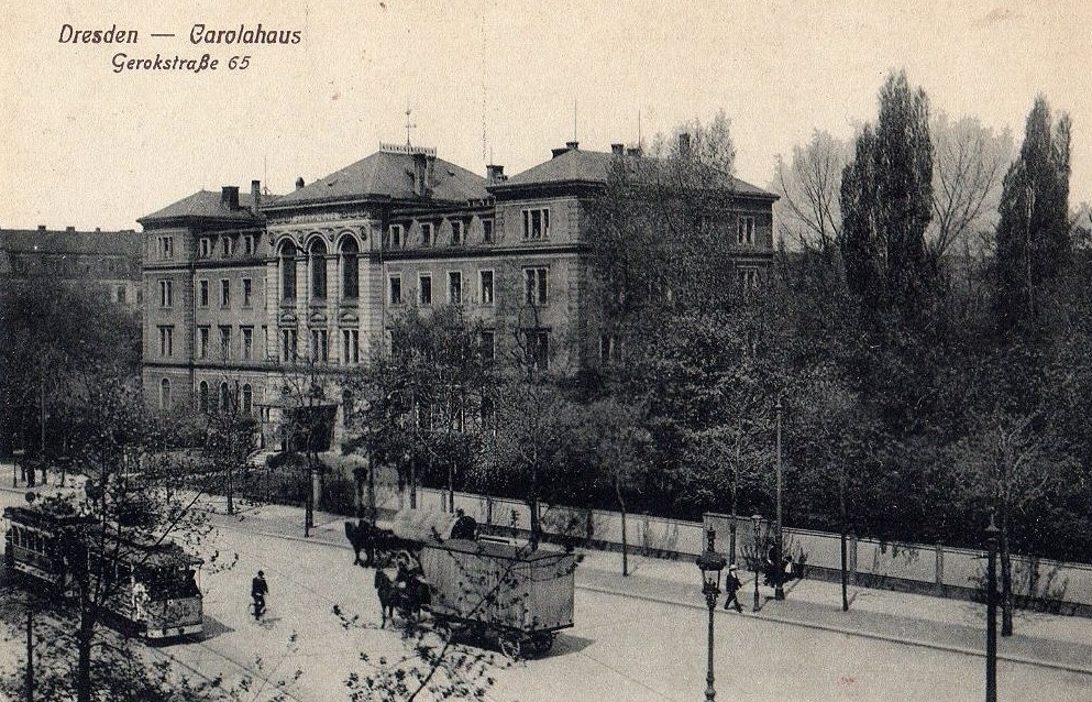 Das Carolahaus in Dresden. Postkarte von 1909.